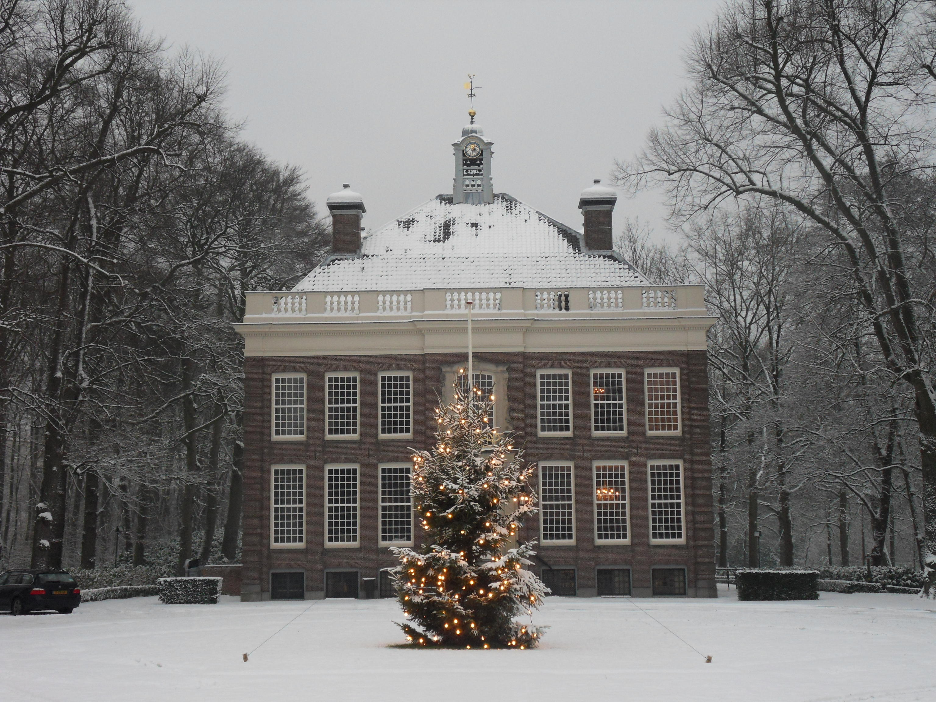 Besneeuwd Sparrendaal met kerstboom.